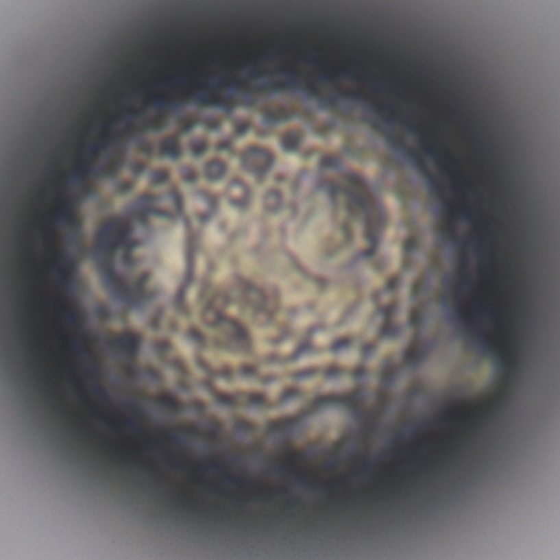 Pollenkorn der Roten-Lichtnelke (400x)